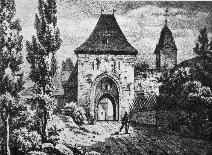 Junkerstor oder Vaalser Tor der Stadtmauer Aachen